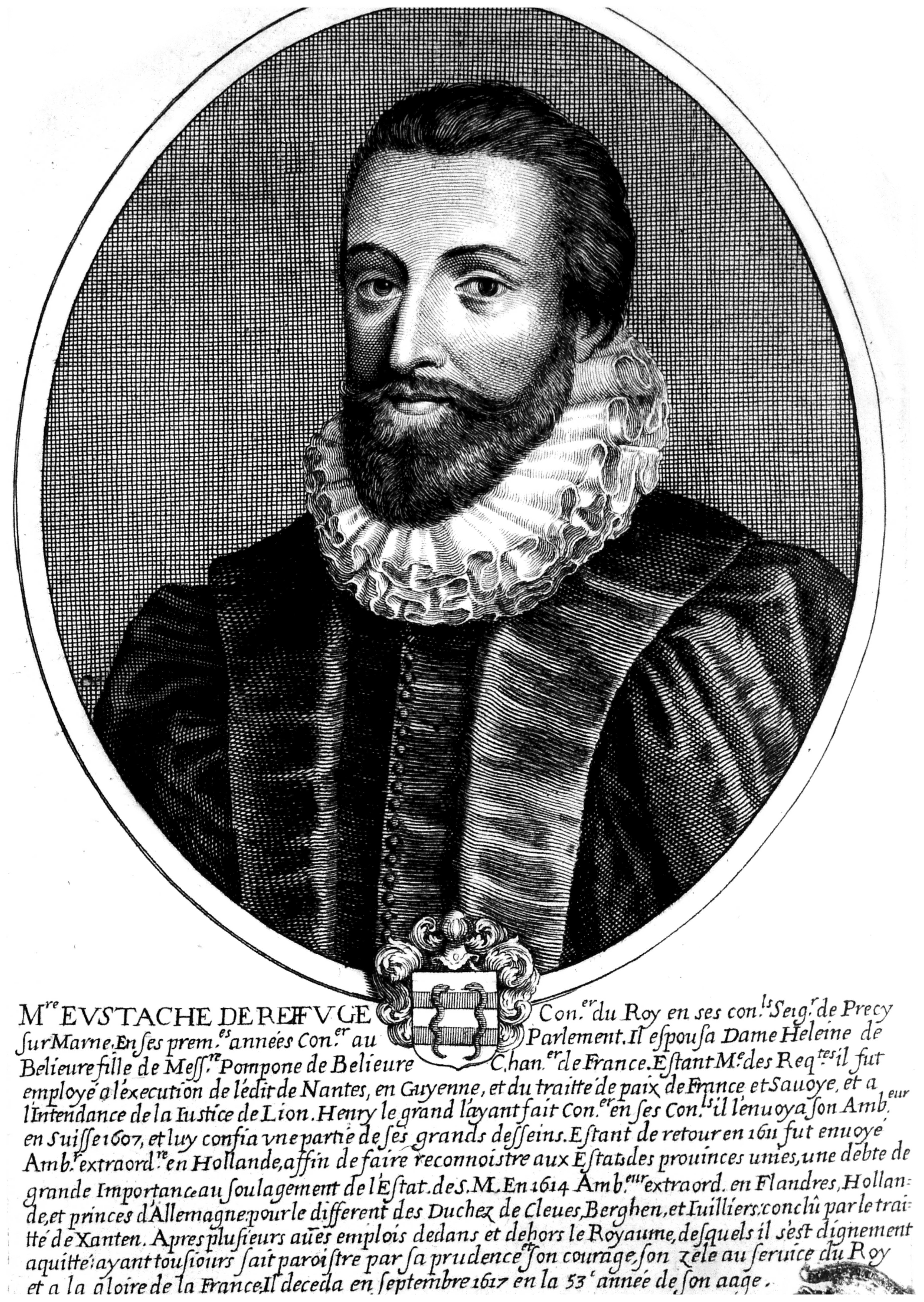 dessin représentant eustache de refuge.